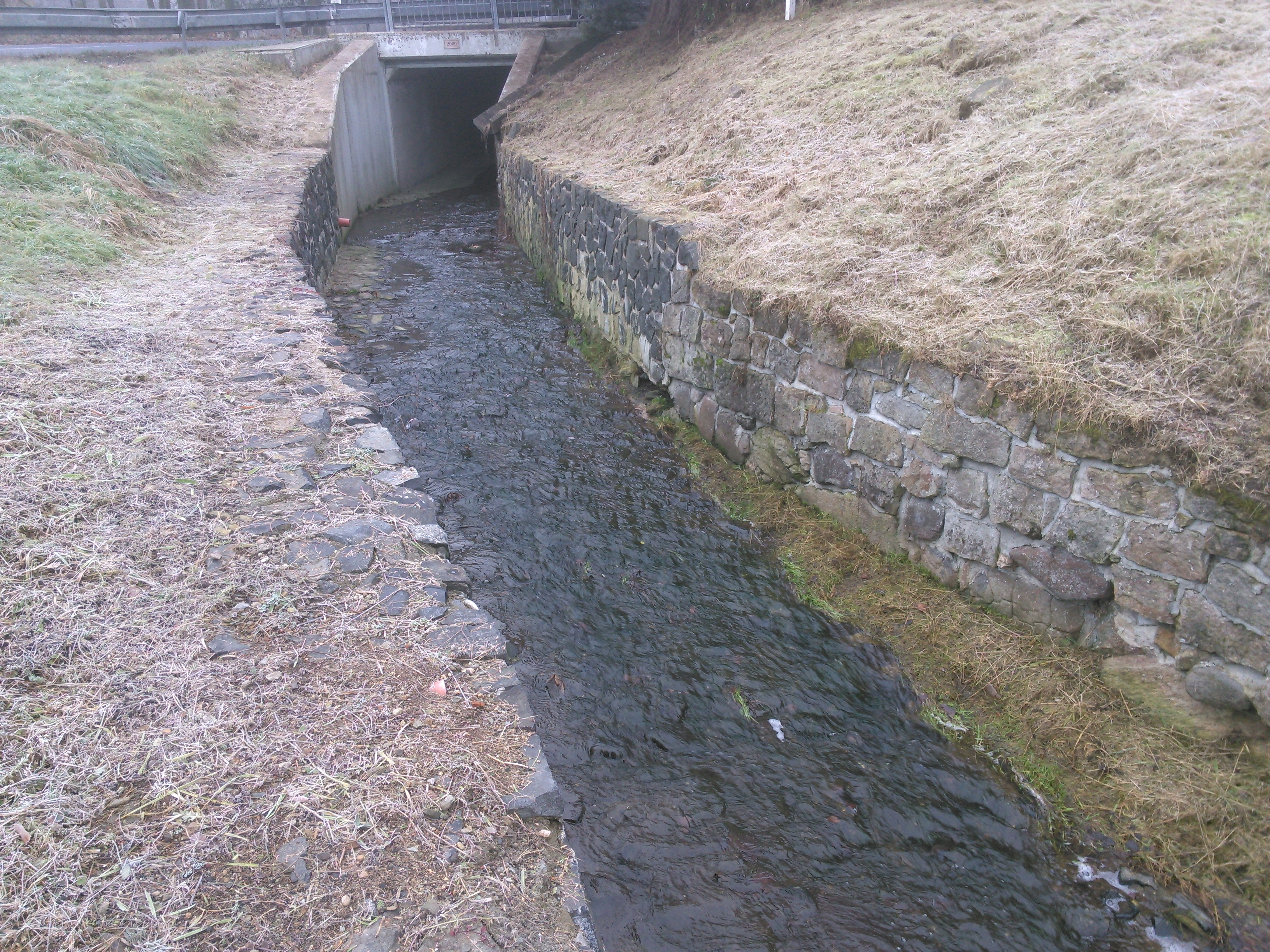 Potok u jeho ústí.